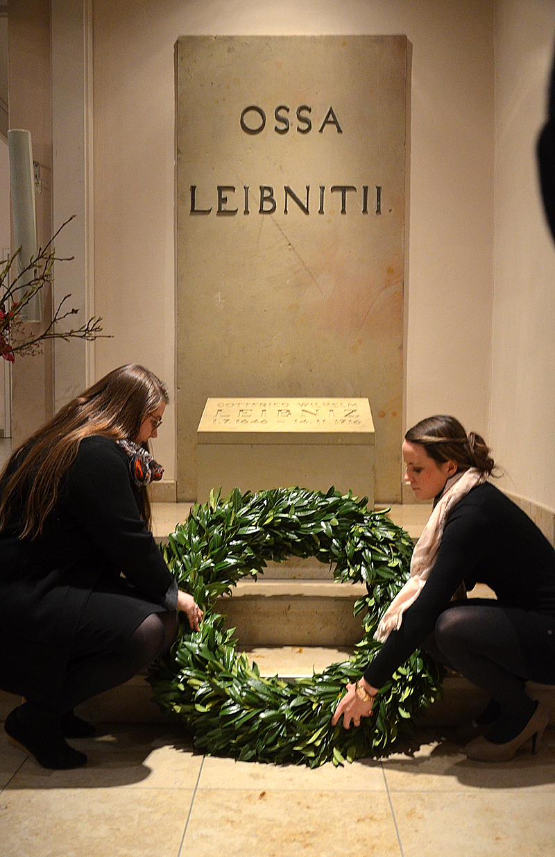 Kranzniederlegung am Grabmal von Gottfried Wilhelm Leibniz in der Neustädter Hof- und Stadtkirche in Hannover am 300. Todestag des Universalgenies durch die Studentinnen der Leibniz Universität Hannover Carina Wiemann und Katharina Kaschner ...